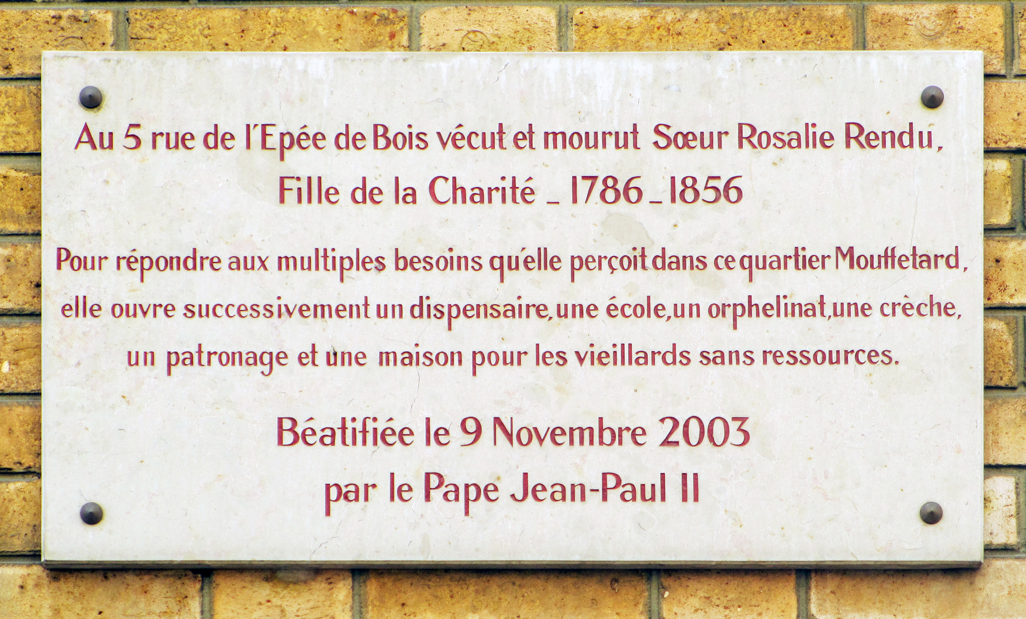 Soeur Rosalie Rendu plaque - 3 rue de l'Épée de Bois, Paris 5